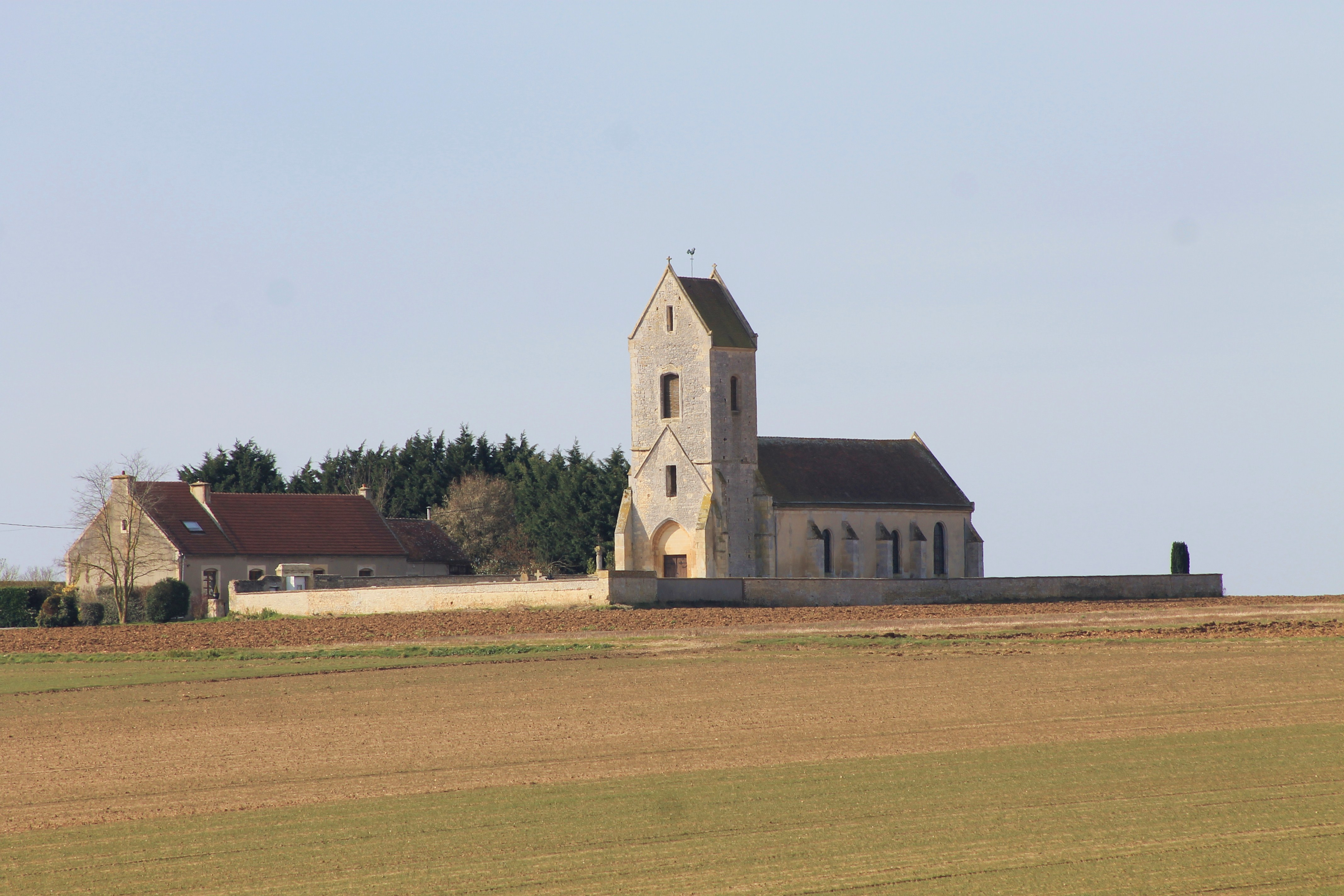 Eglise Notre-Dame Saint-Jean à Estrées-la-Campagne (Calvados)